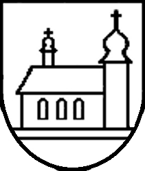 Herb Zabrzega w powiecie bielskim, gminie Czechowice-Dziedzice